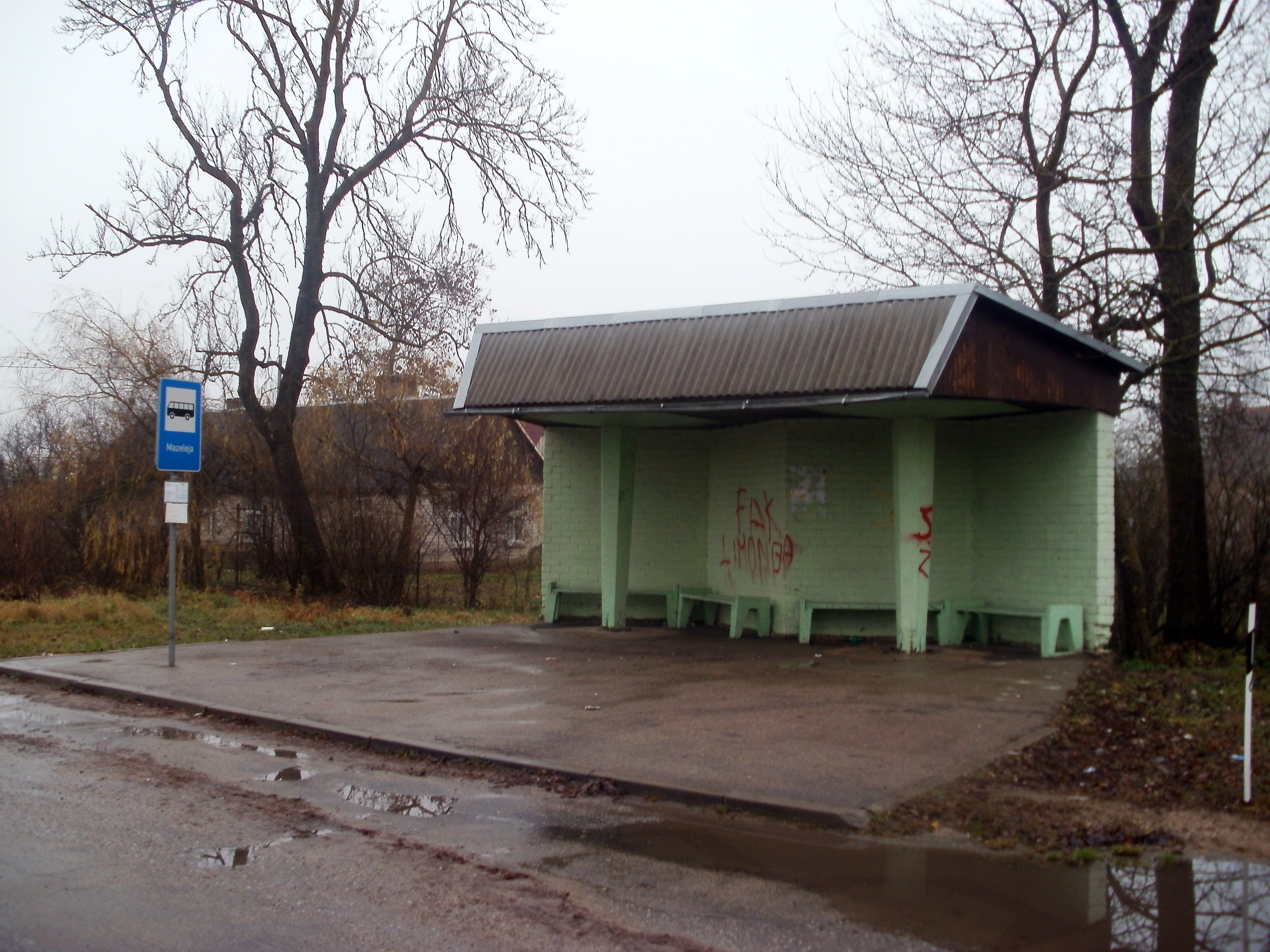 Mazeleja